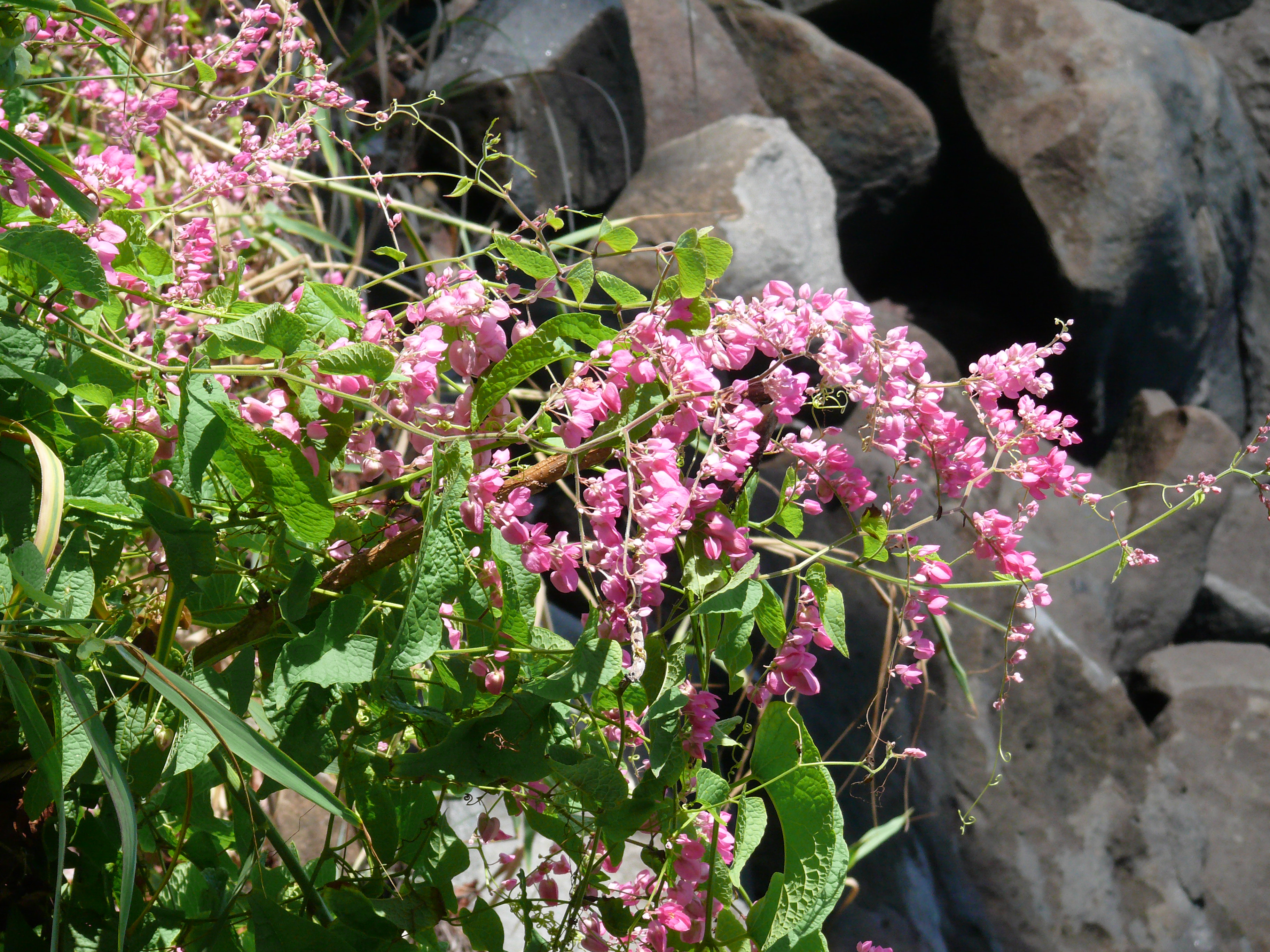 Antigonon leptopus ("coral creeper")